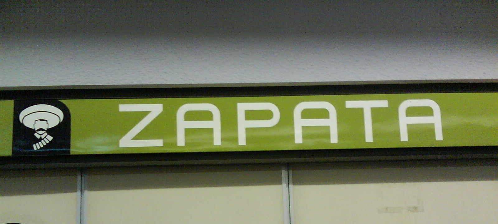 Letrero de la estacíon Zapata del metro